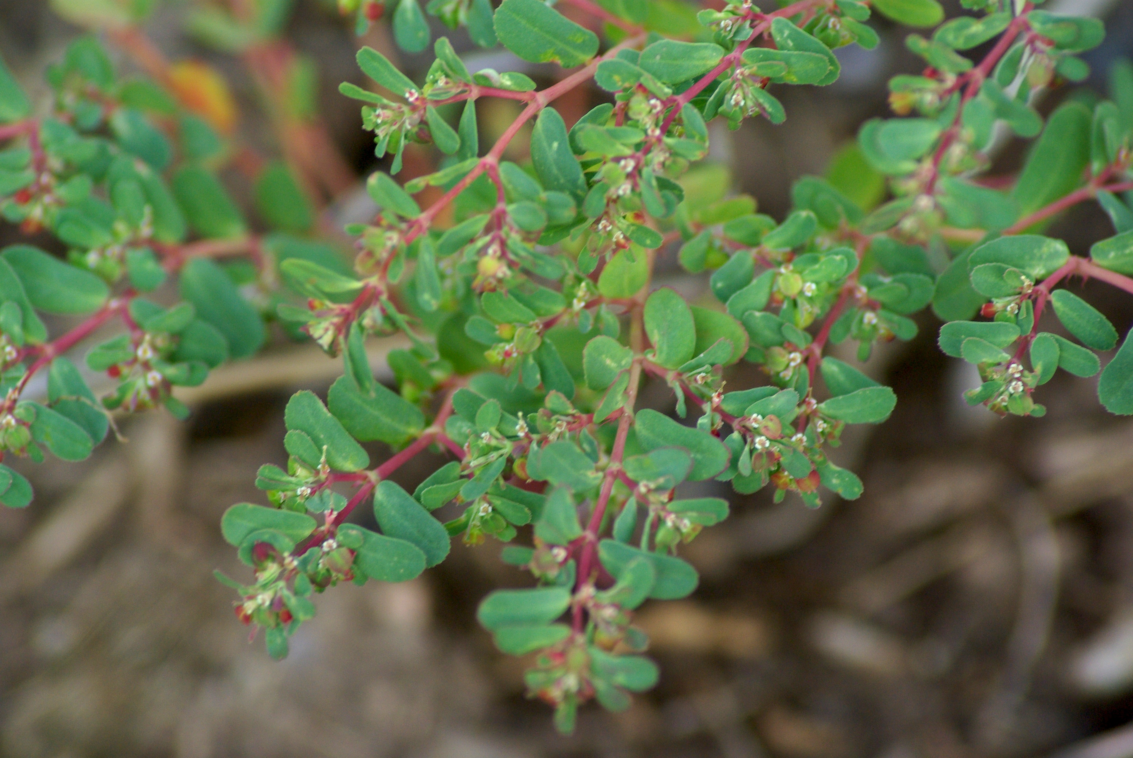 Thyme-leaf spurge, Euphorbia serpyllifolia, Española, New Mexico